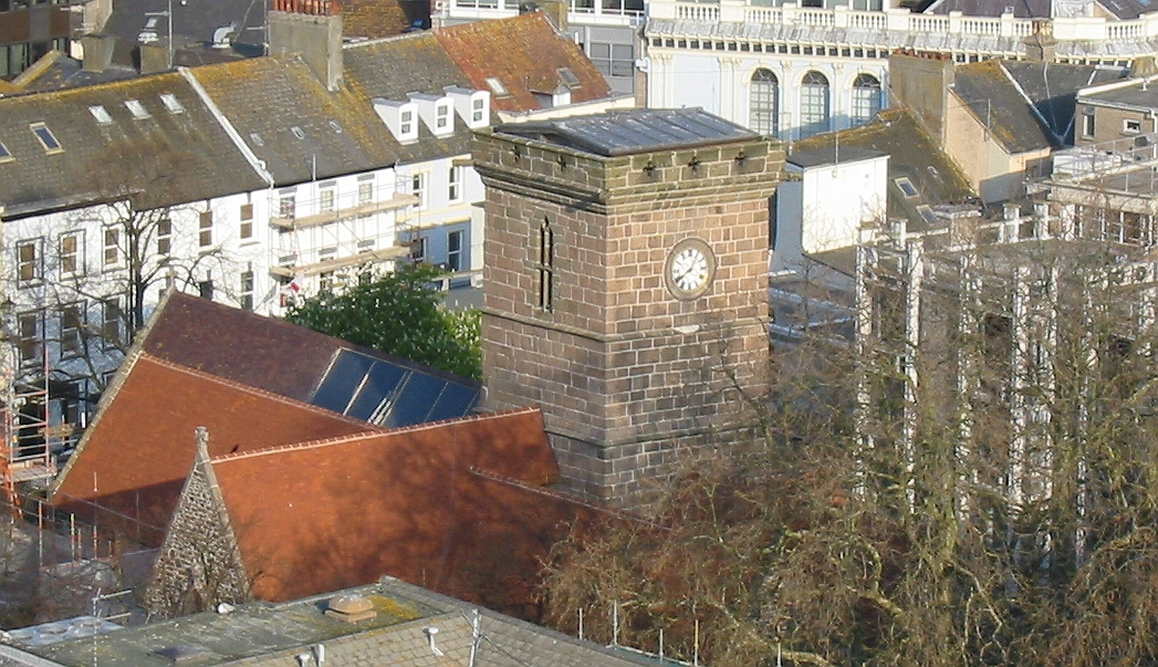 Nrf: Saint Hélyi, Jèrri